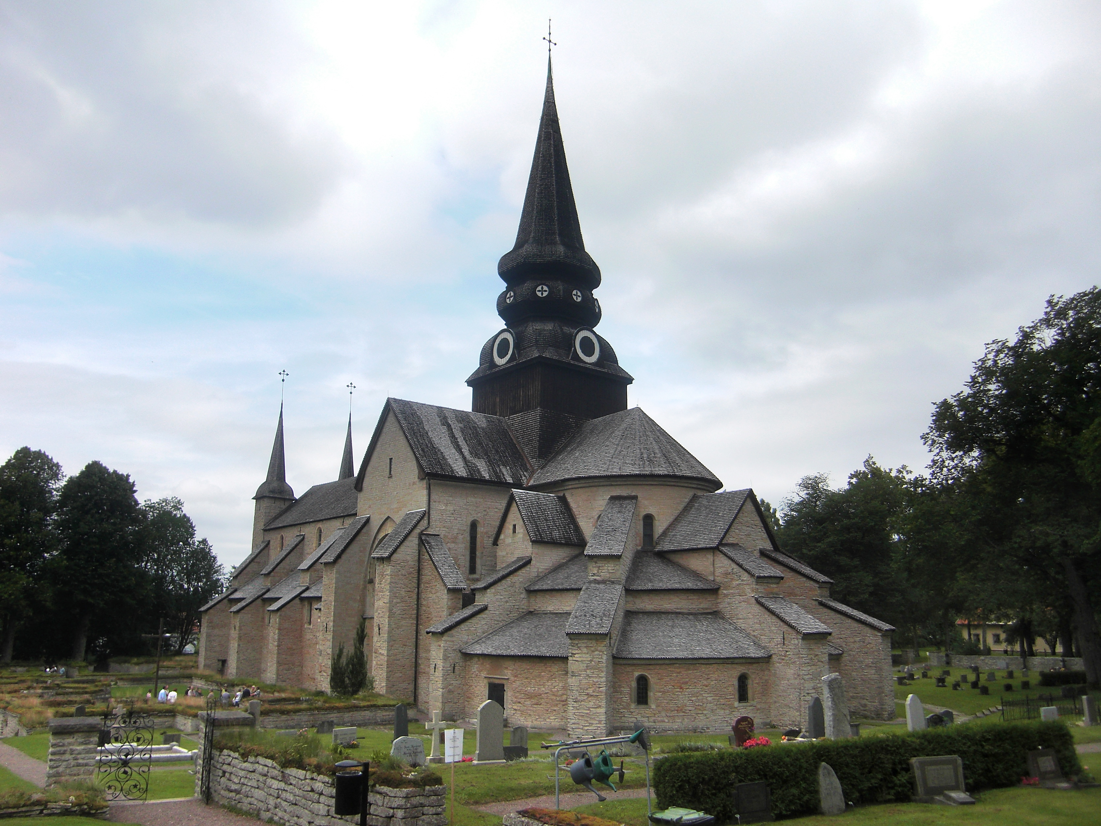 Varnhems klosterkyrka i Varhems socken i Valle härad i Skara kommun, f.d. Skaraborgs län, Skara stift, Västergötland, Västra götalands län, Sverige.